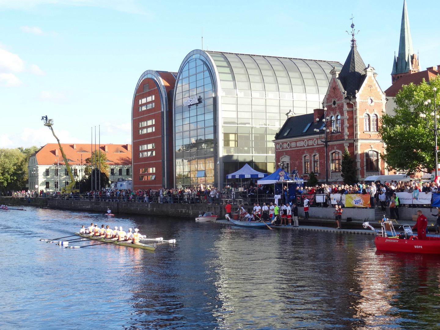 XXV Wielka Wioślarska o Puchar Brdy